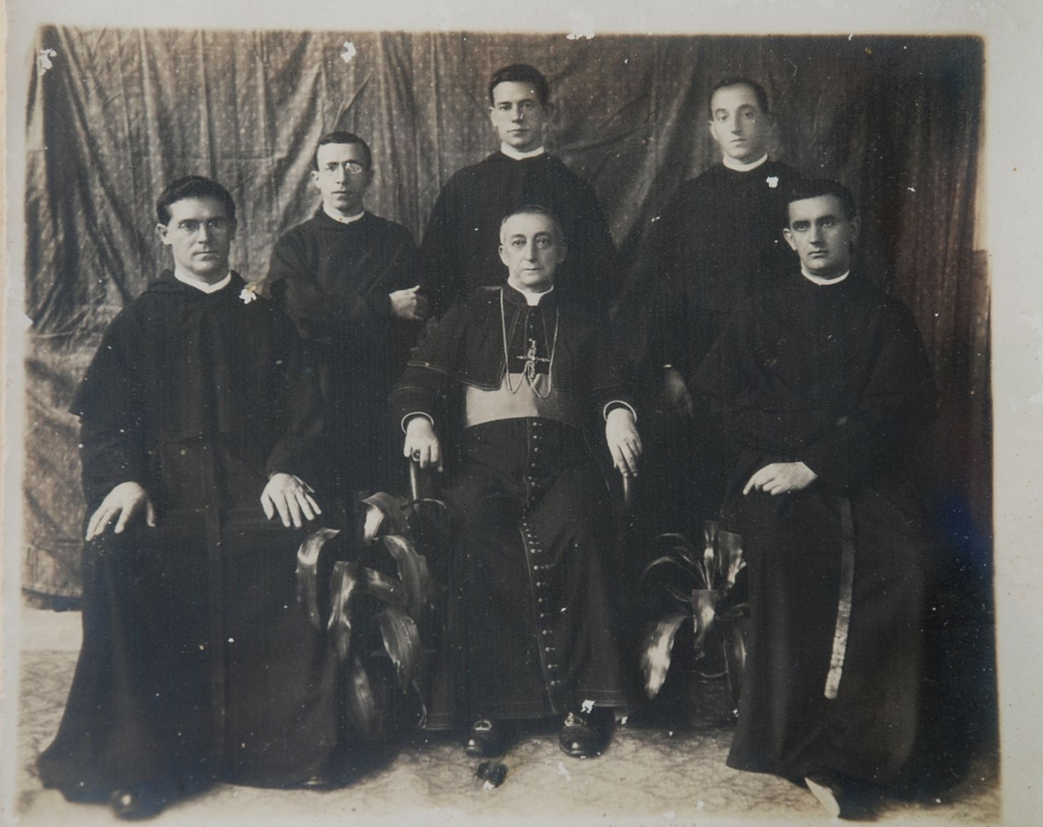 El padre Lucas Espinosa rodeado de compañeros Agustinos. En el centro el Obispo bien de Palencia, Valladolid o Burgos que estuviera en estas sedes entorno a los años 20 del siglo XX.